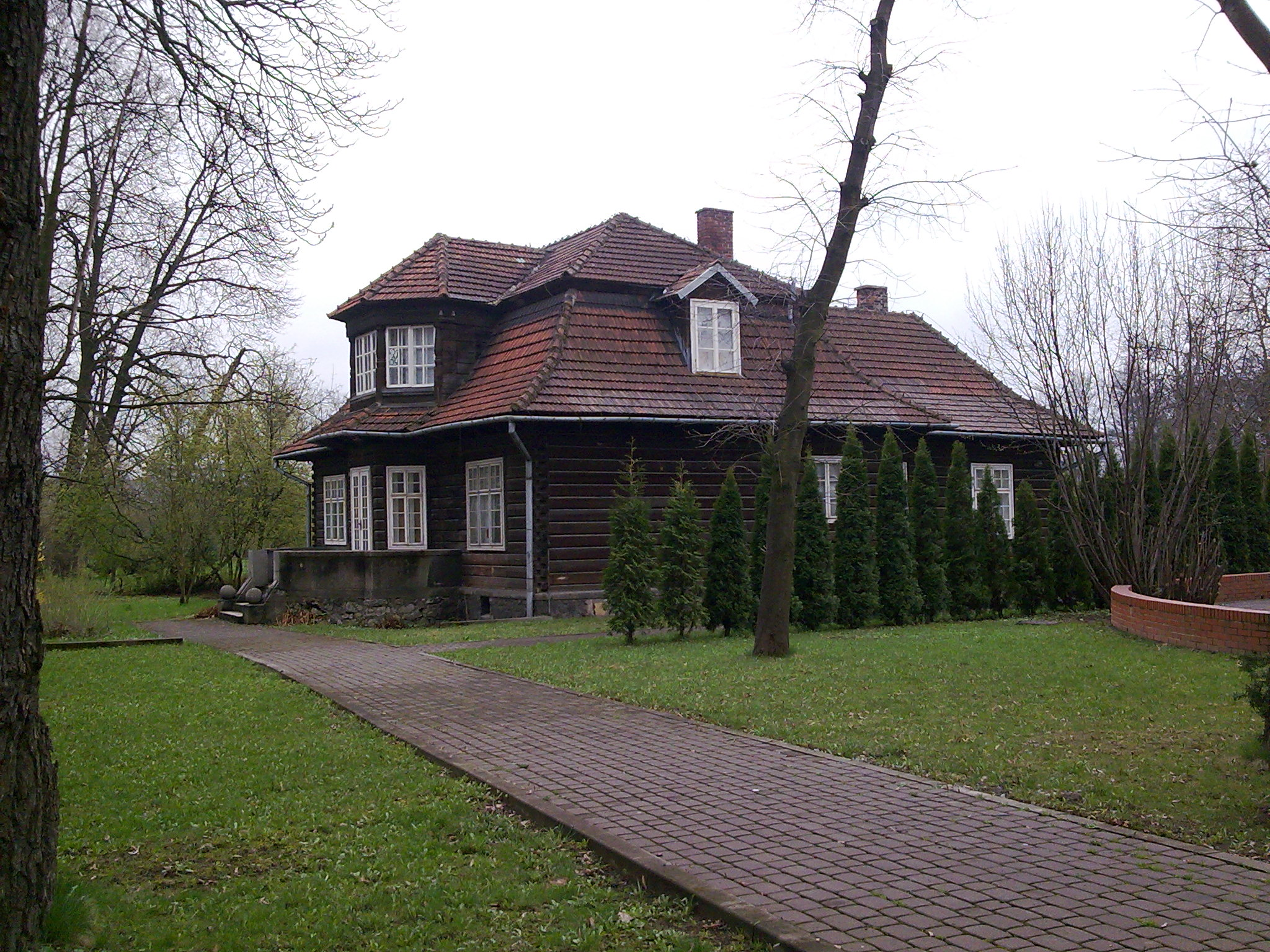 "Willa Japonka" z 1920 roku, dawniej lokal dla kuracjuszy.